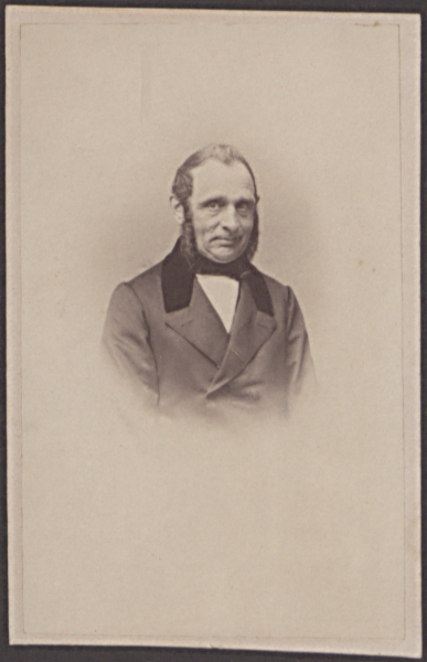 Portrait des Gießener Theologieprofessors August Wilhelm Knobel, vor 1863 (Visitbild, s/w)